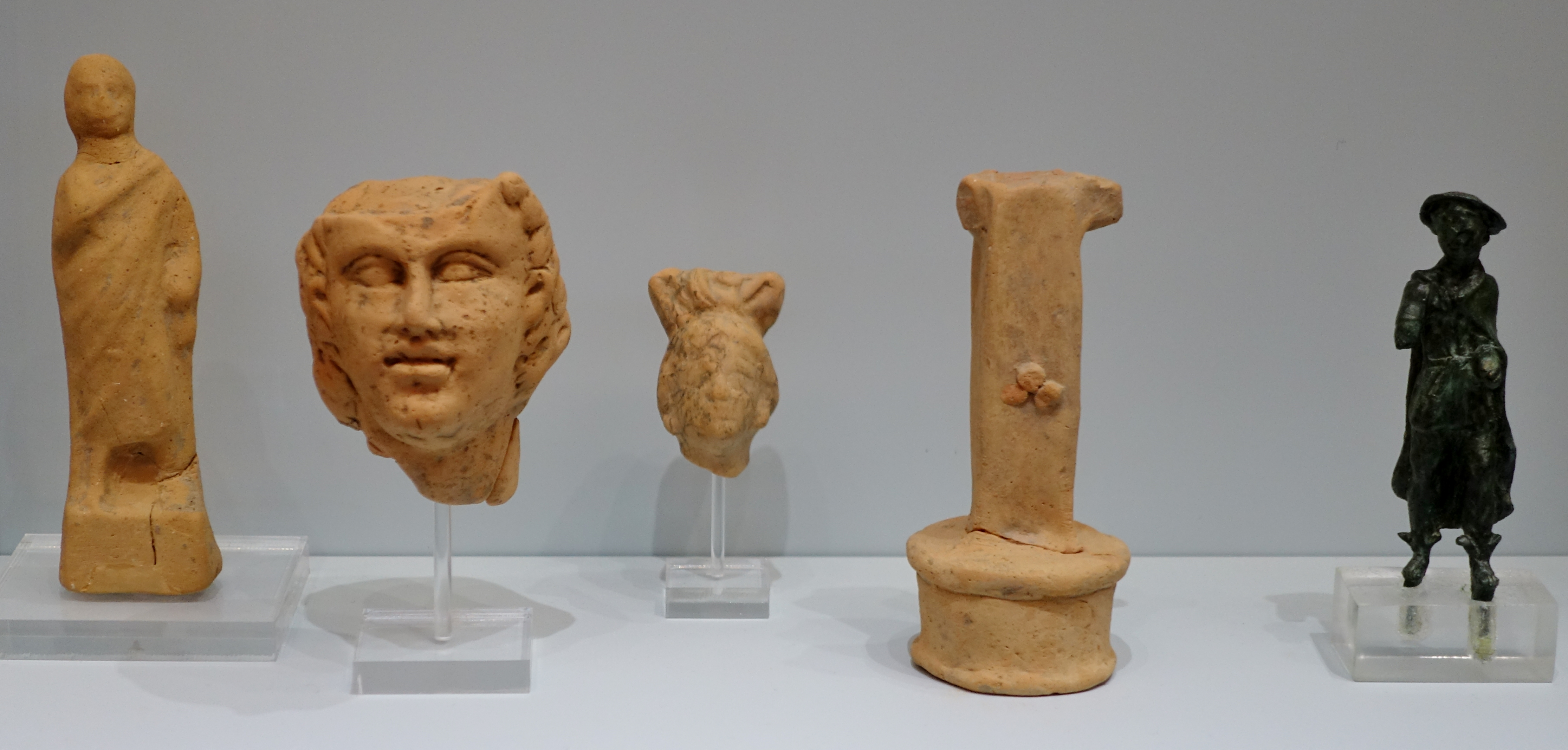 Figuren des Hermes und Modell einer „Hermessäule“ (Hellenistische bis frühchristliche Zeit, 3. Jahrhundert v. Chr. bis 6. Jahrhundert n. Chr.), gefunden im Heiligtum des Hermes und der Aphrodite bei Symi, Archäologisches Museum von Iraklio, Kreta, Griechenland